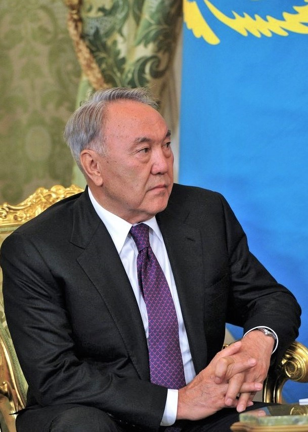 Встреча Владимира Путина с Нурсултаном Назарбаевым